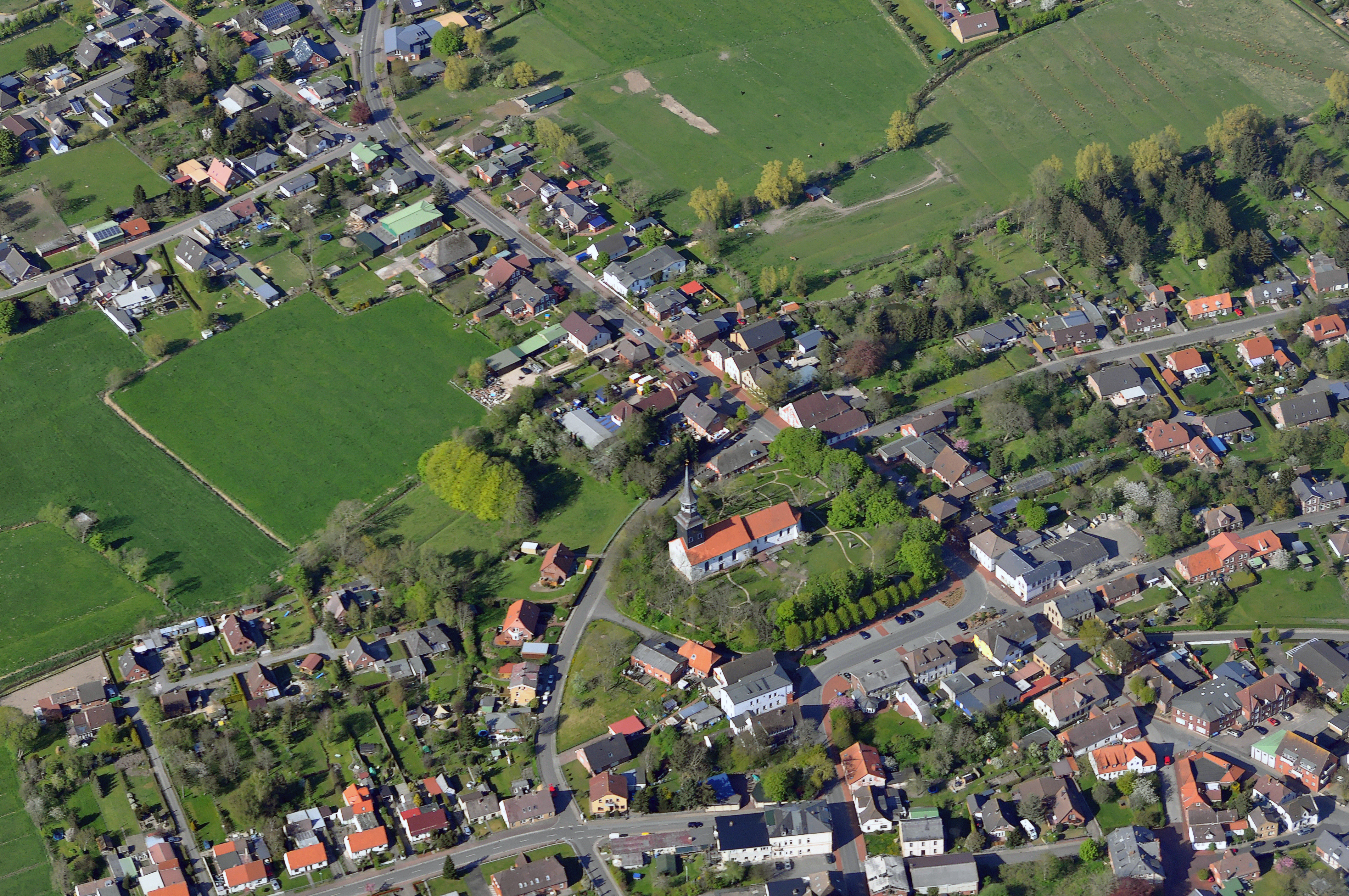 Luftbilder von der Nordseeküste 2012-05